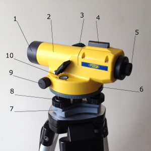 Optinis automatinis nivelyras